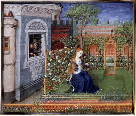 Giovanni Boccaccio: Emilia in the rosegarden (Teseida) (detail).